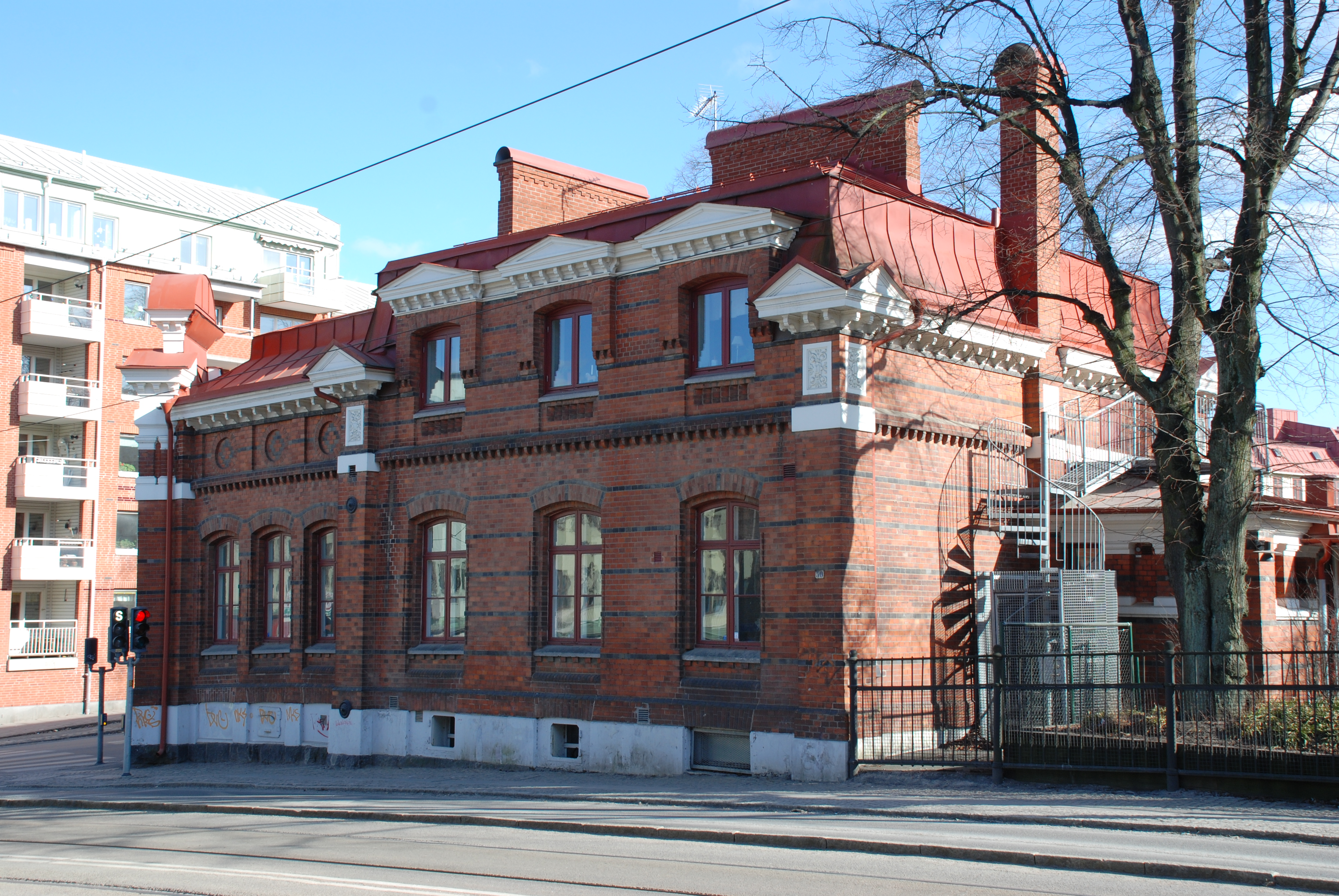 Majornas småbarnsskola, Karl Johansgatan 50, i Göteborg.